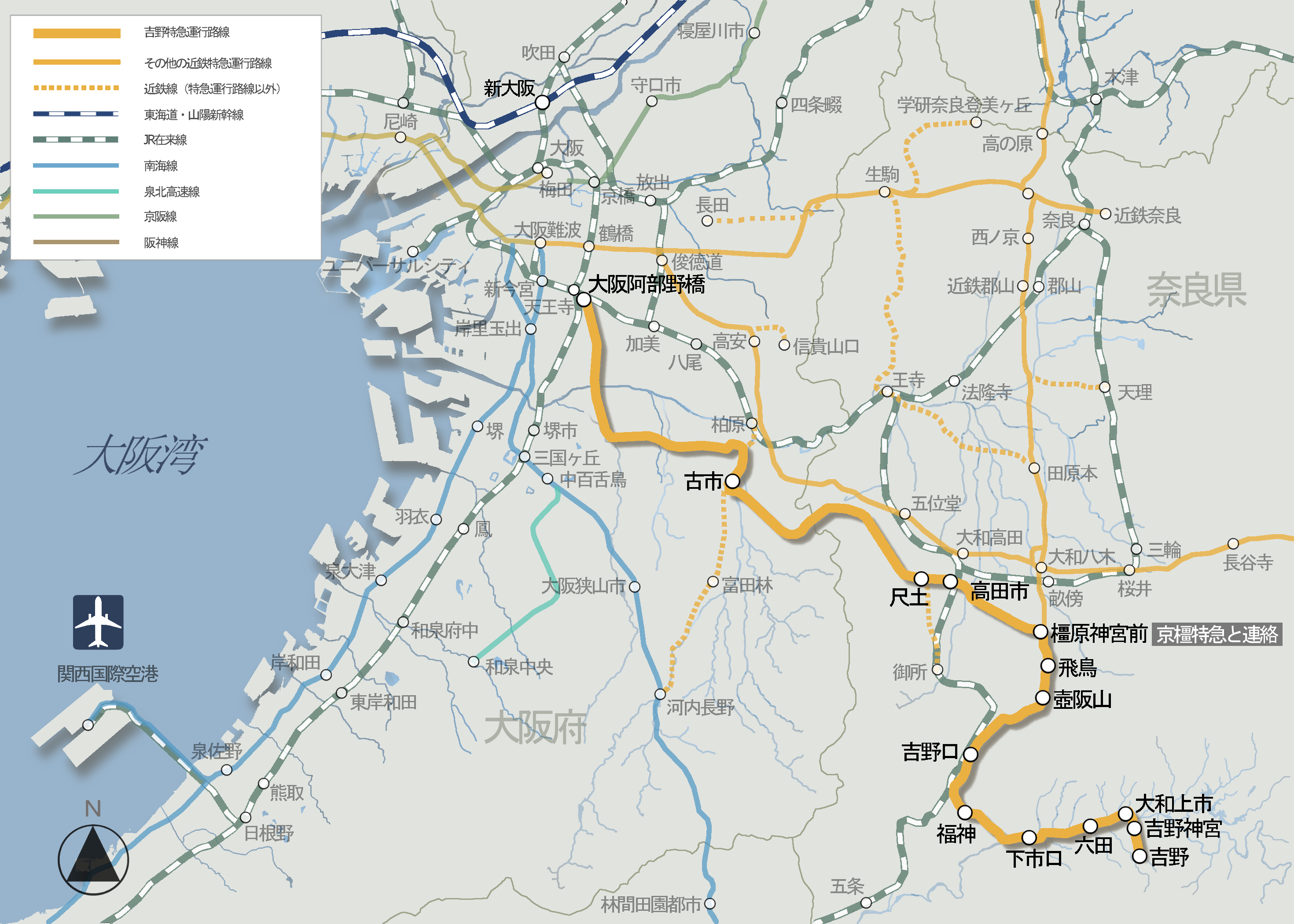 近鉄吉野特急ルートマップ